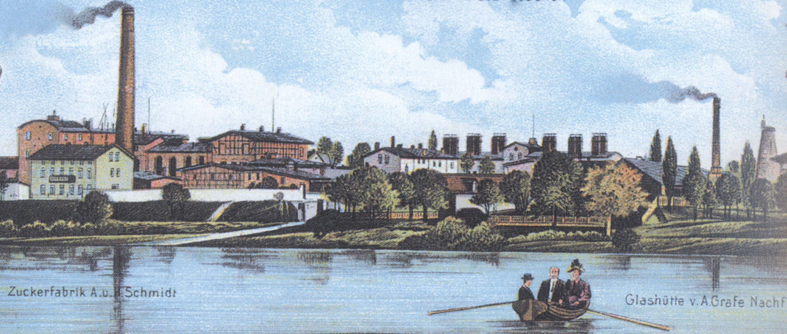 Blick von der Elbe aus auf das Industriegelände nördlich von Westerhüsen